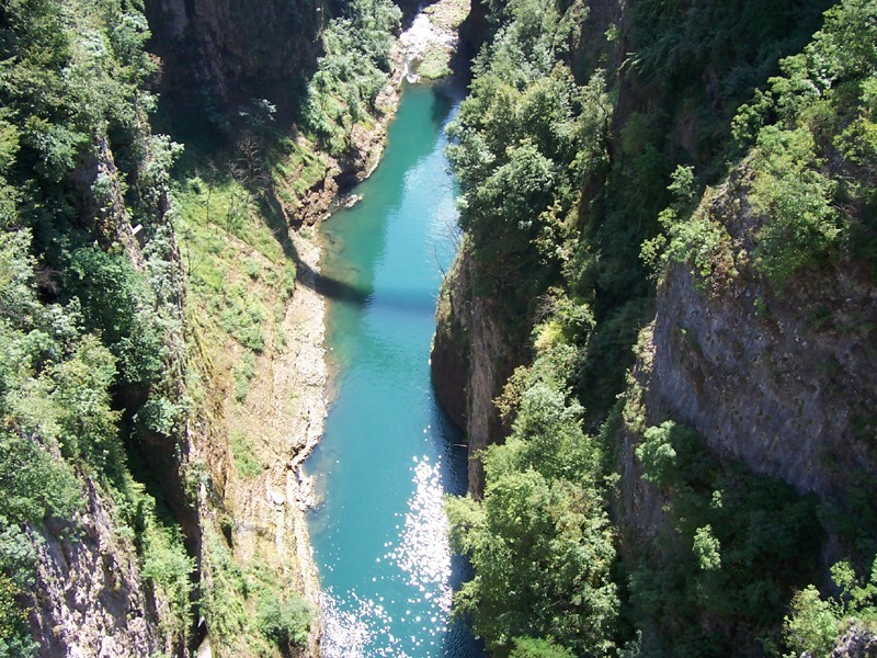 Cles - Gola di S. Giustina